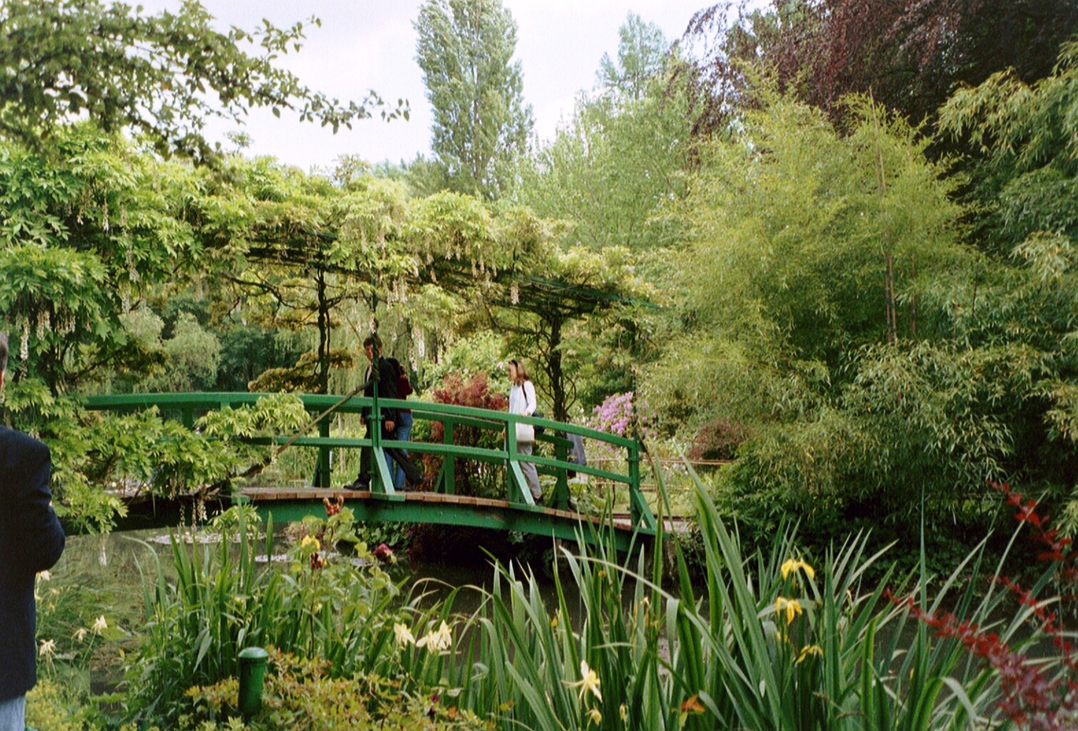 Bruecke im Garten von Giverny